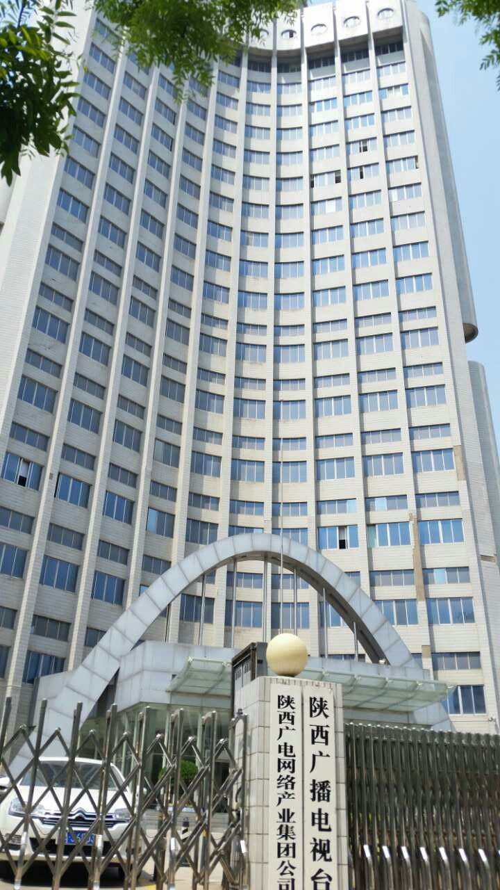 陝西廣播電視台總部